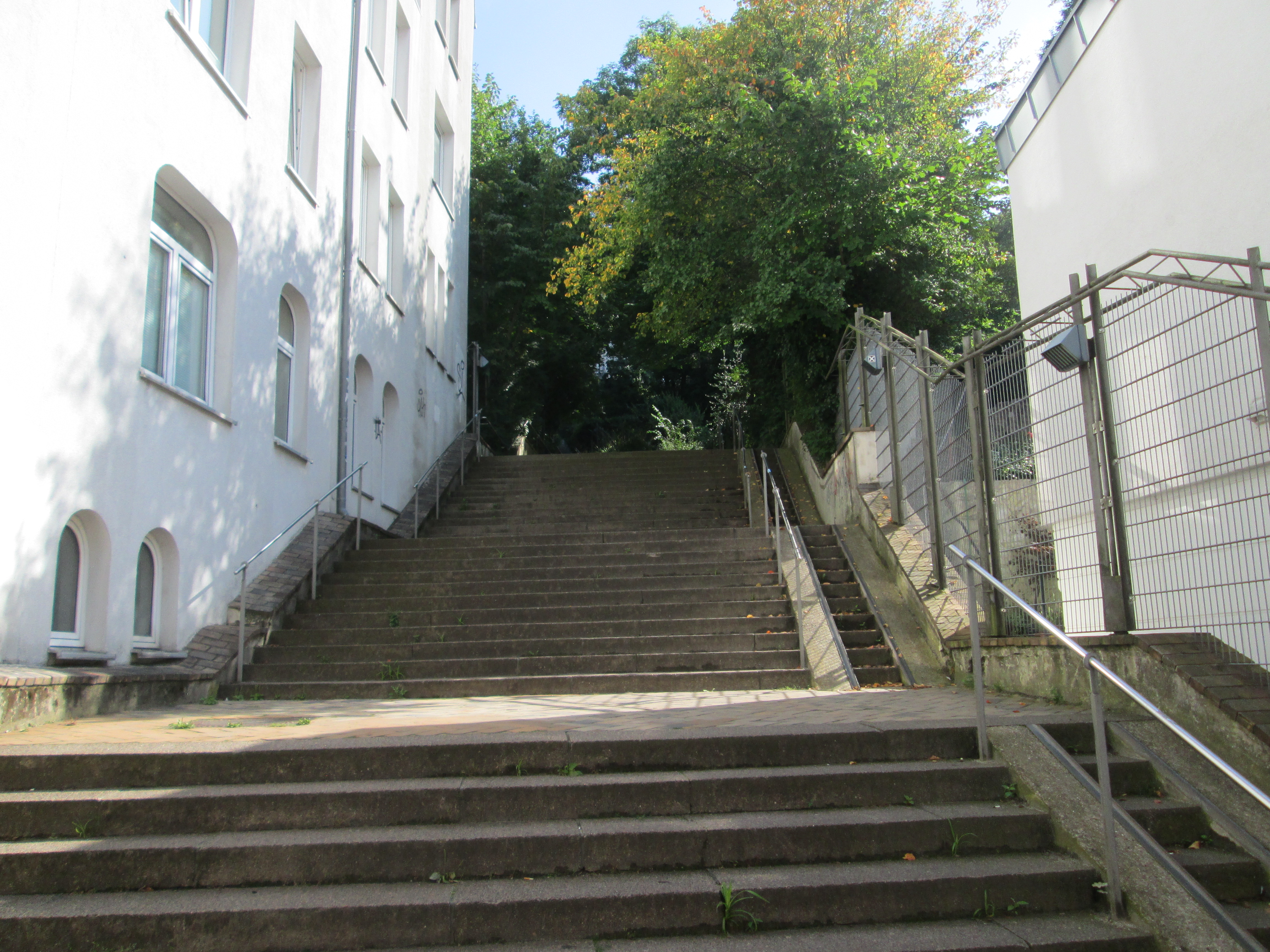 Sankt Jørgens Trappe i Flensborg